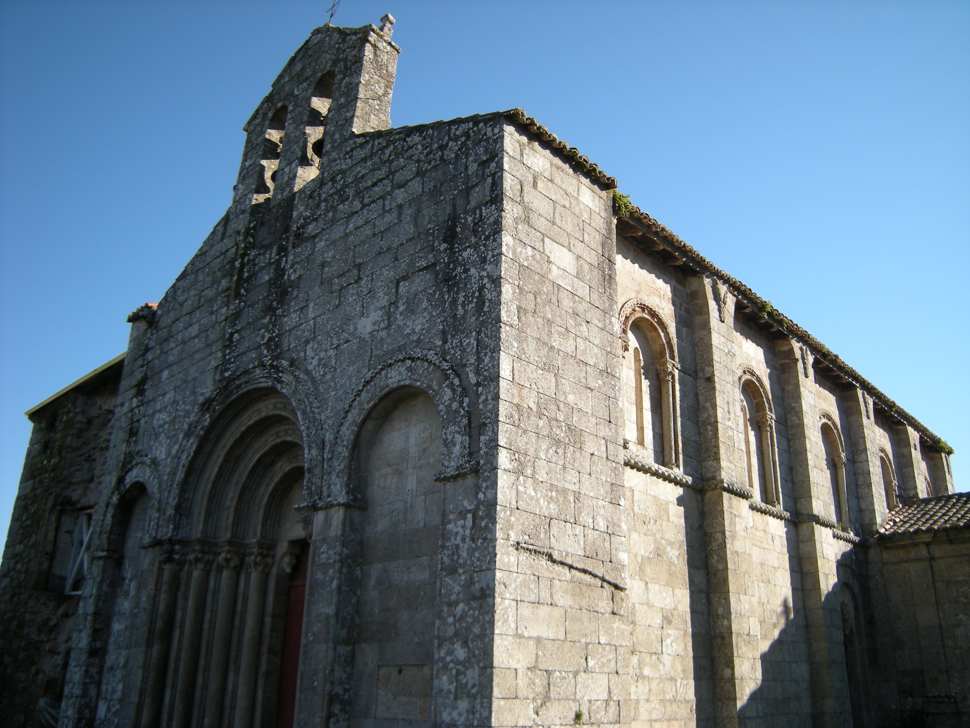 Perteneció a un antiguo monasterio benedictino. La iglesia debió construirse a finales del siglo XII y guarda mucha relación con la cercana iglesia de Santo Estevo de Ribas de Miño.